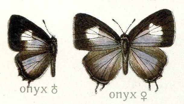 Horaga onyx, Lycaenidae